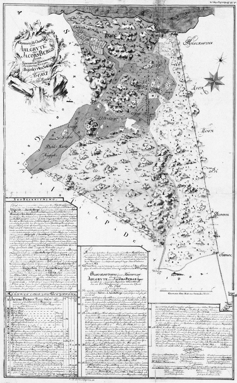 Karta över Jakobsbergs ägor 1767.